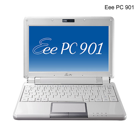 ASUS Eee PC 901.